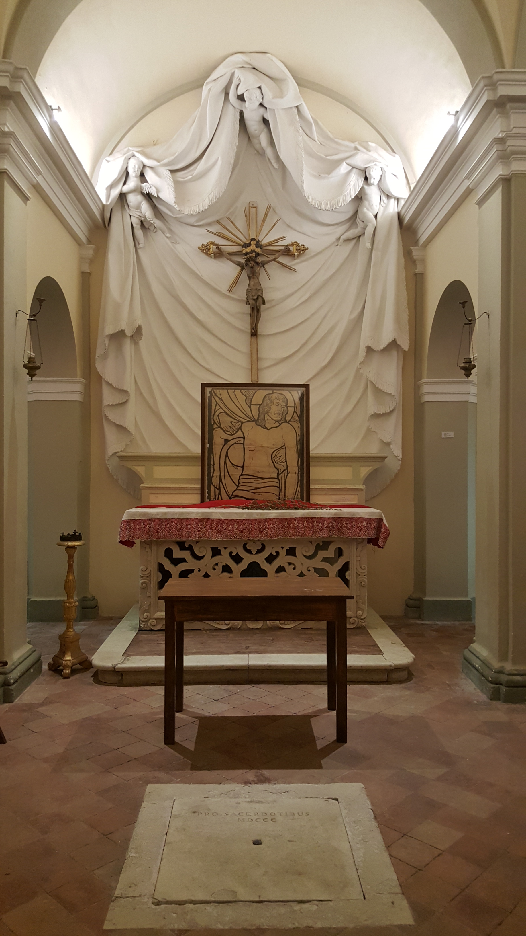 Museo di Saludecio e del Beato Amato This is a photo of a monument which is part of cultural heritage of Italy.